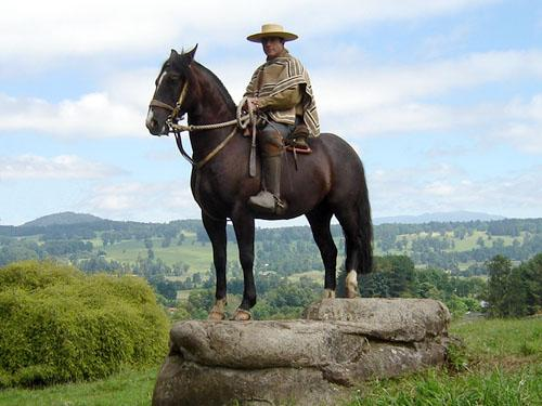 El huaso Matías Muñoz